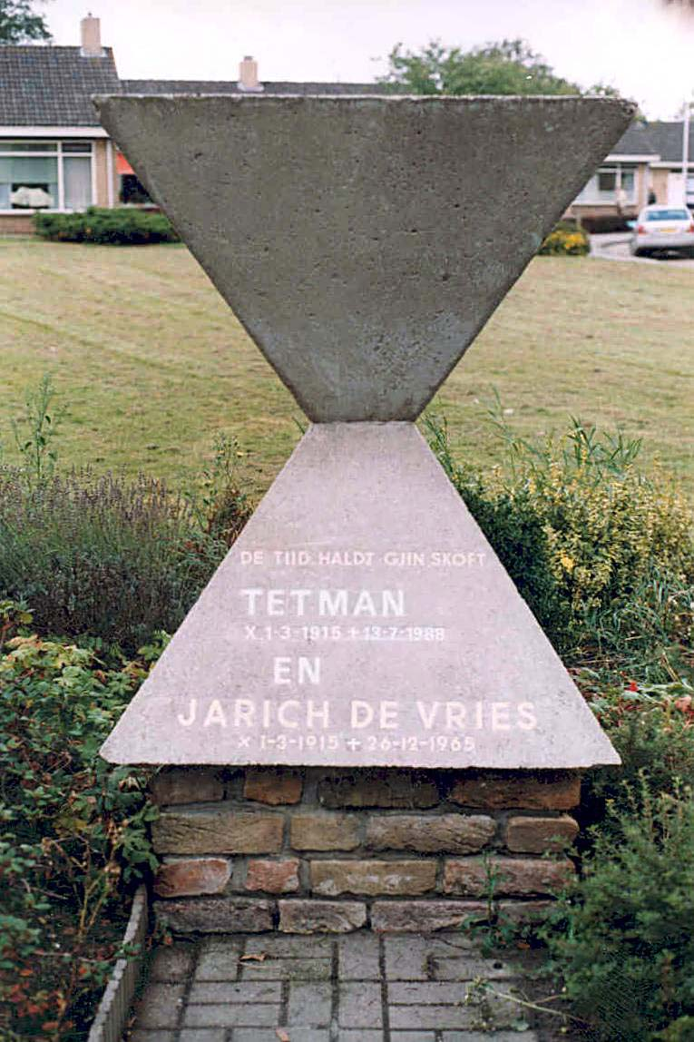 Meinte Walta, 1965